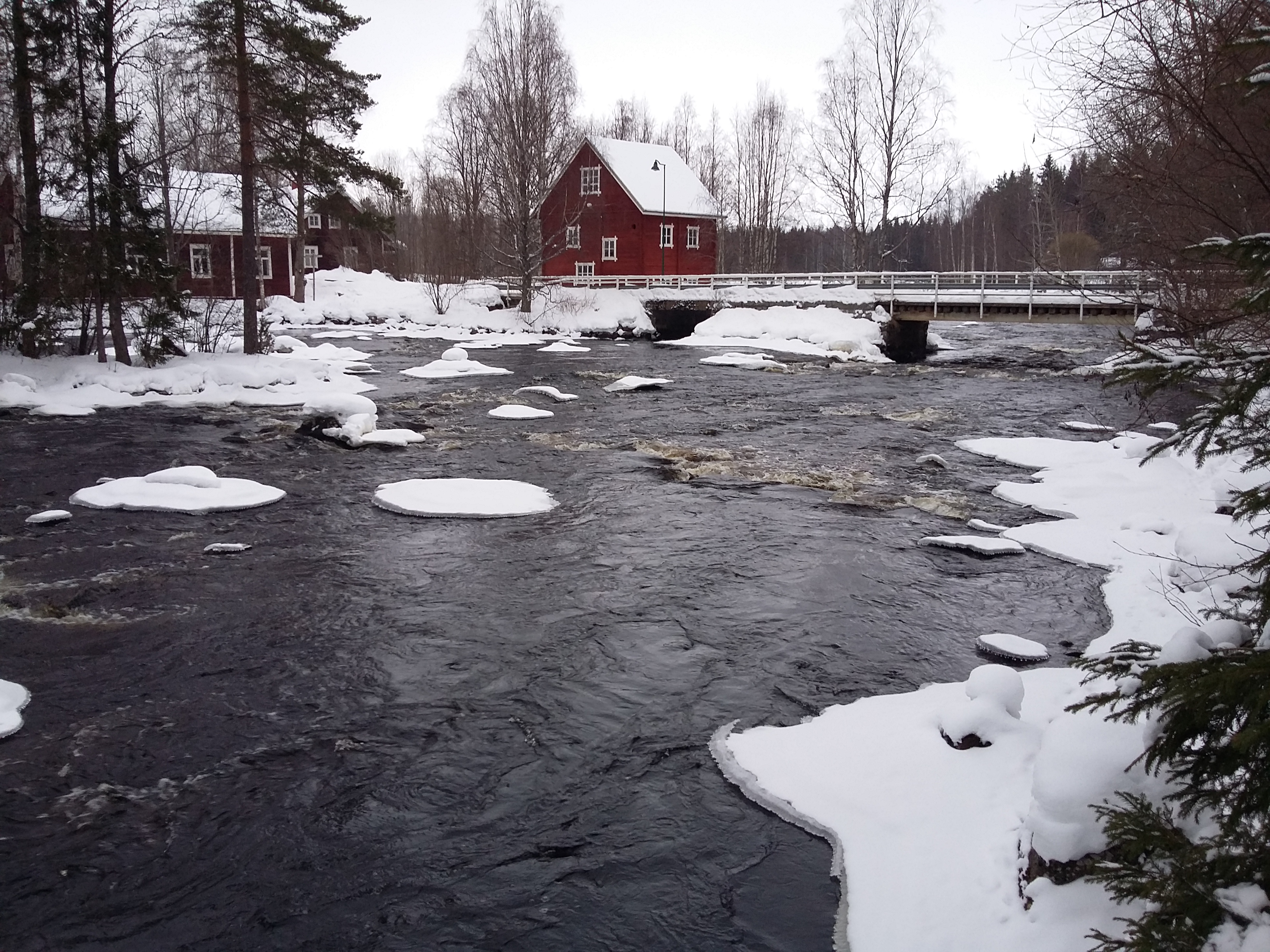 Huopanakosken pääuoma Kuninkaanväylä etualalla, taustalla näkyy vanha silta ja vanha mylly. Huopanankoski sijaitsee Viitasaarella, pohjoisessa Keski-Suomessa.